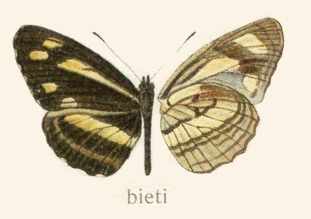 Neptis bieti